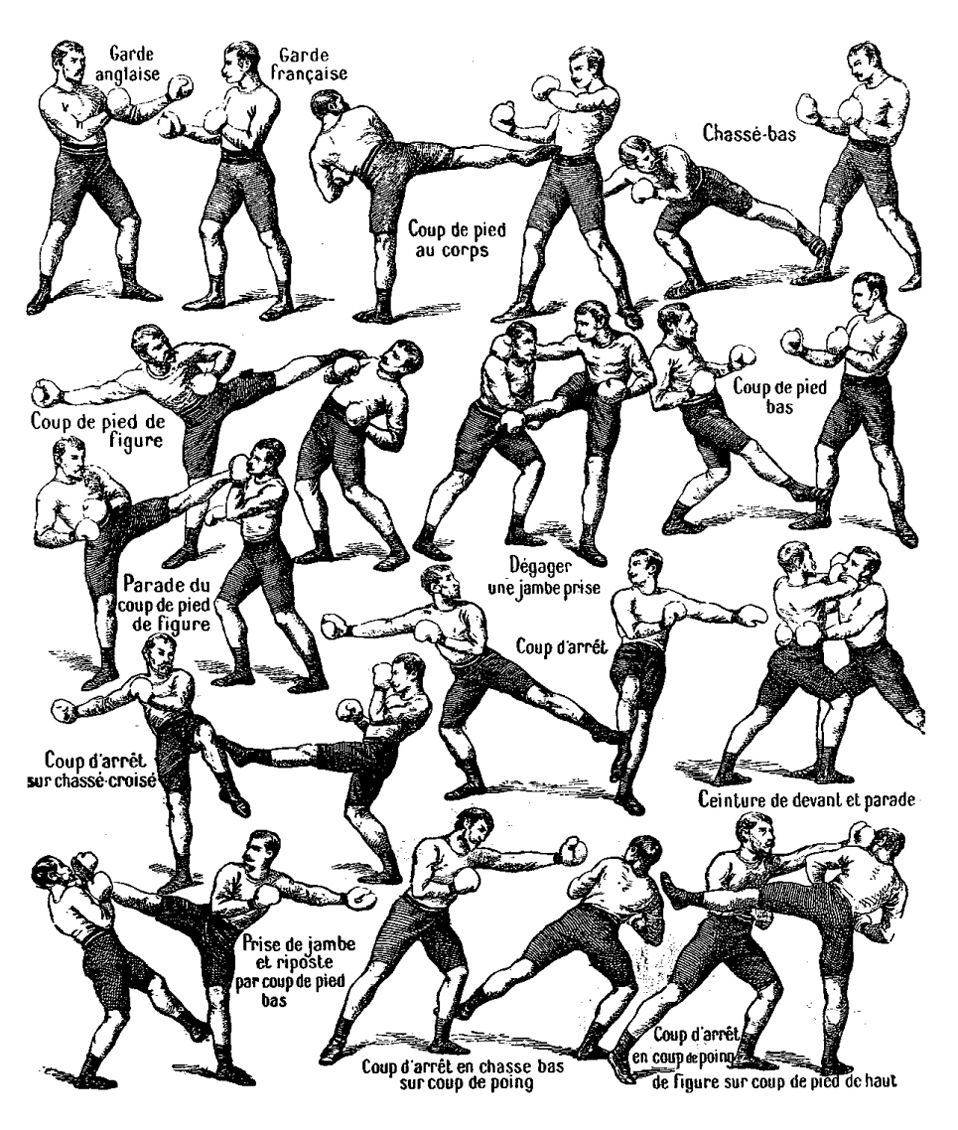 Planche de techniques de savates semblable à celle parue en 1910 de Leclerc Ainé sur la méthode Lecour (source: Savate, chausson et boxe française d'hier et d'aujourd'hui de Michel DELAHAYE)